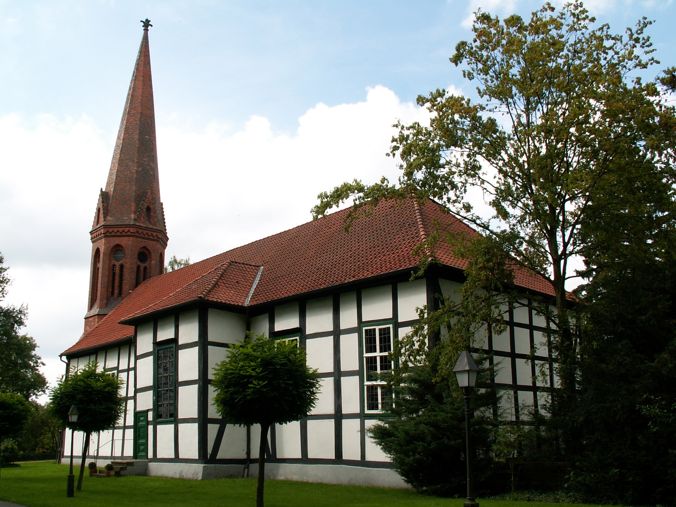 Johanniskirche in Bohmte, Ortsteil Arenshorst, Ansicht von Südosten